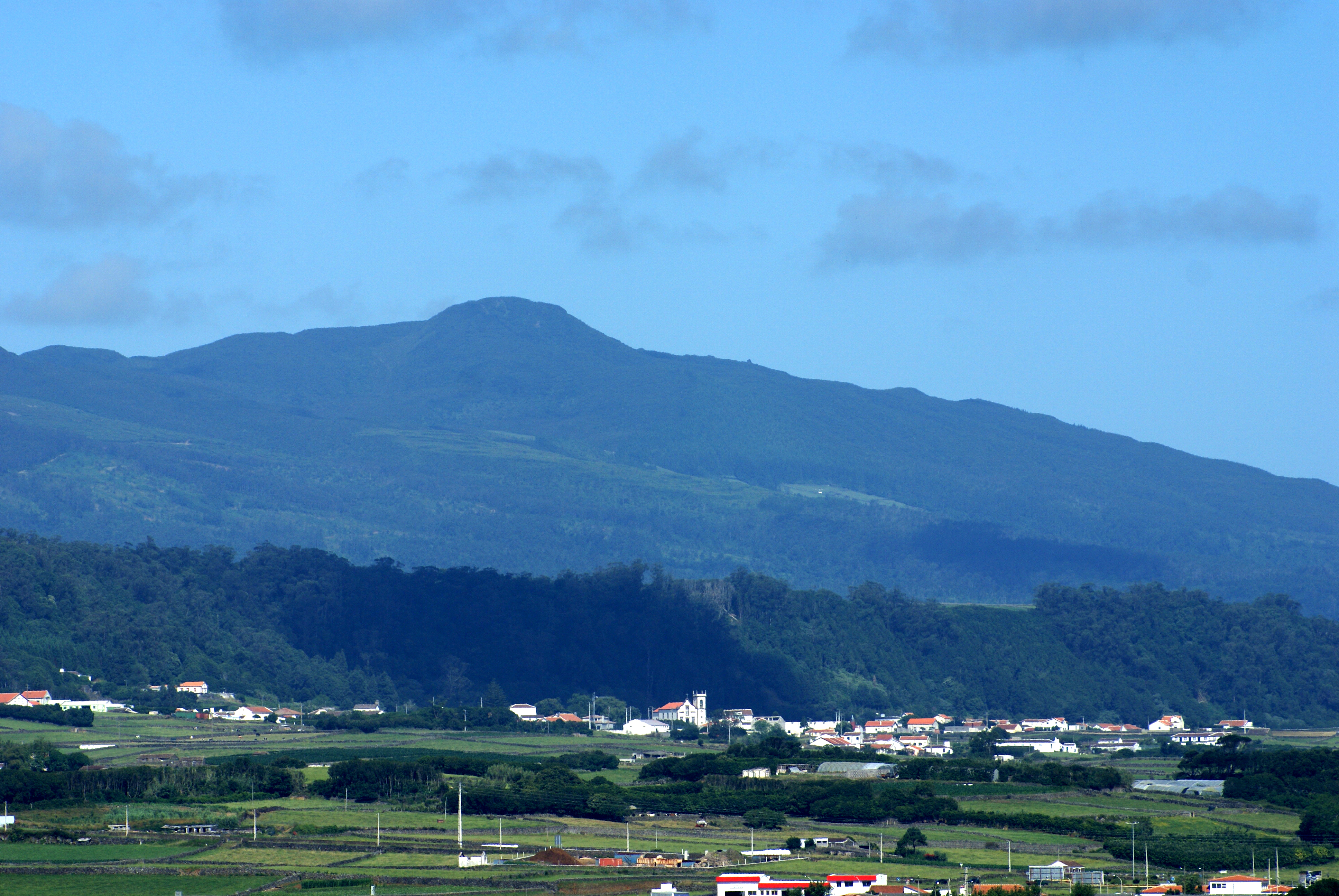 Pico Alto, Praia da Vitória, ilha Terceira, Açores